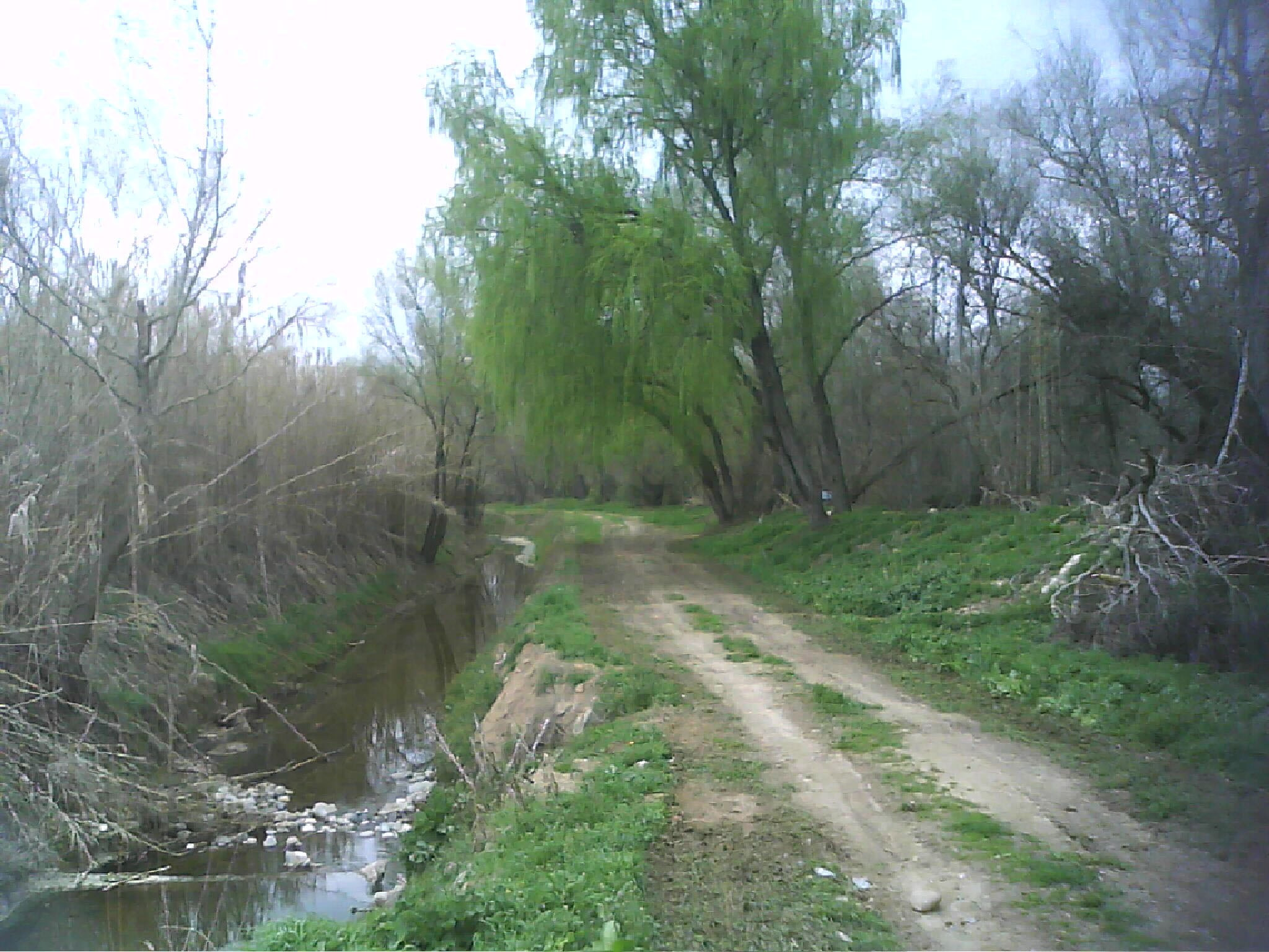 Tram final del Canal d'Urgell proper al riu Segre a l'àrea coneguda com els Patamolls de Montoliu de Lleida, al terme Municipal de Montoliu de Lleida.